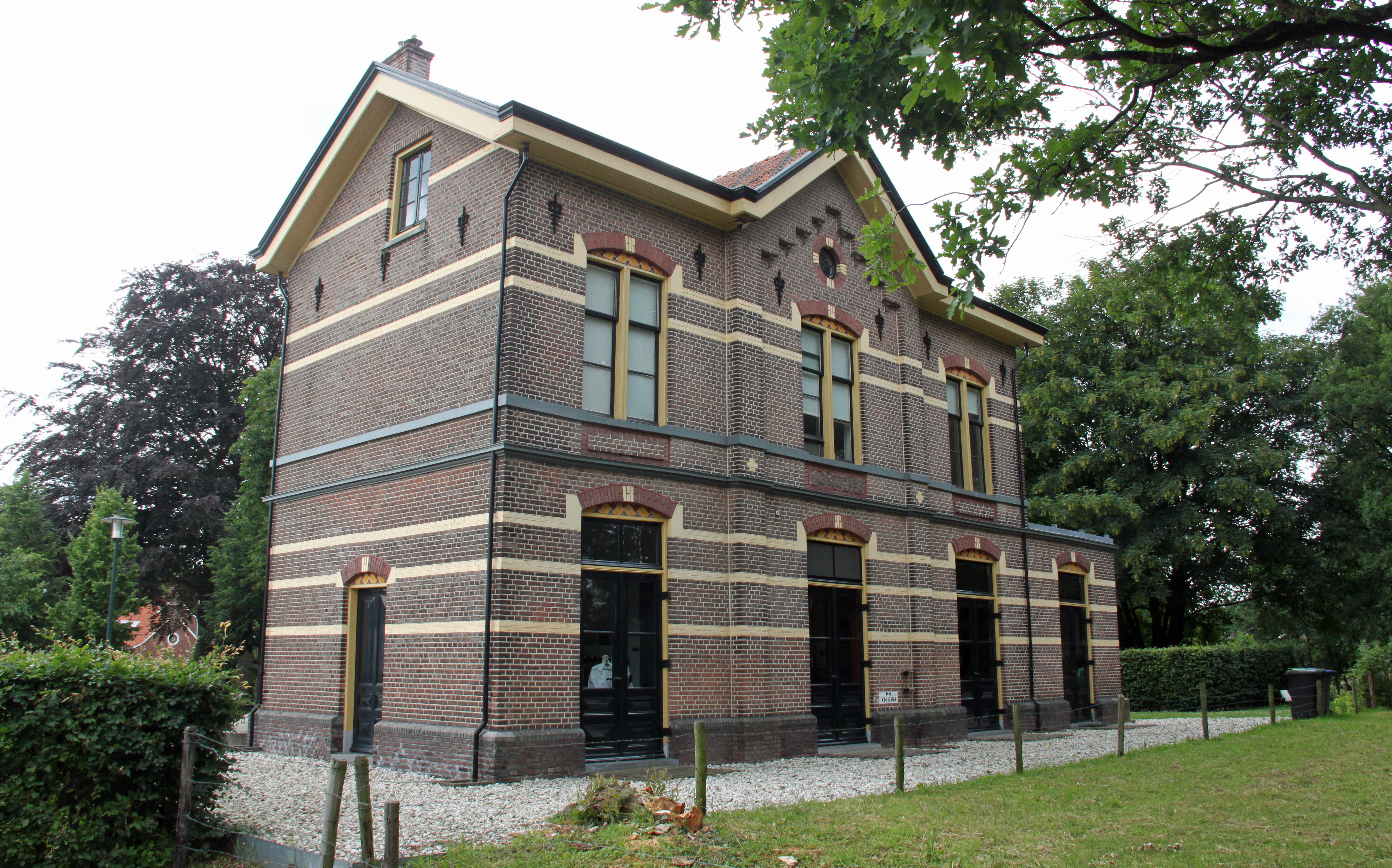 Het voormalige treinstation van Groenlo, nabij het huidige busstation van Groenlo.